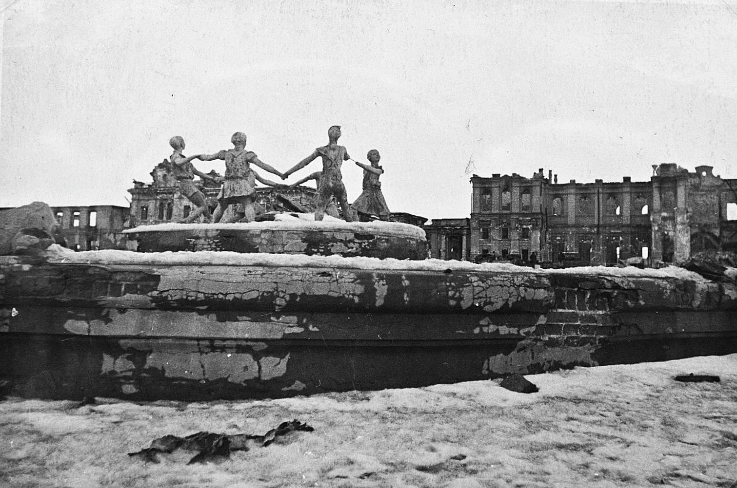 Фонтан «Детский хоровод» на вокзальной площади после окончания Сталинградской битвы